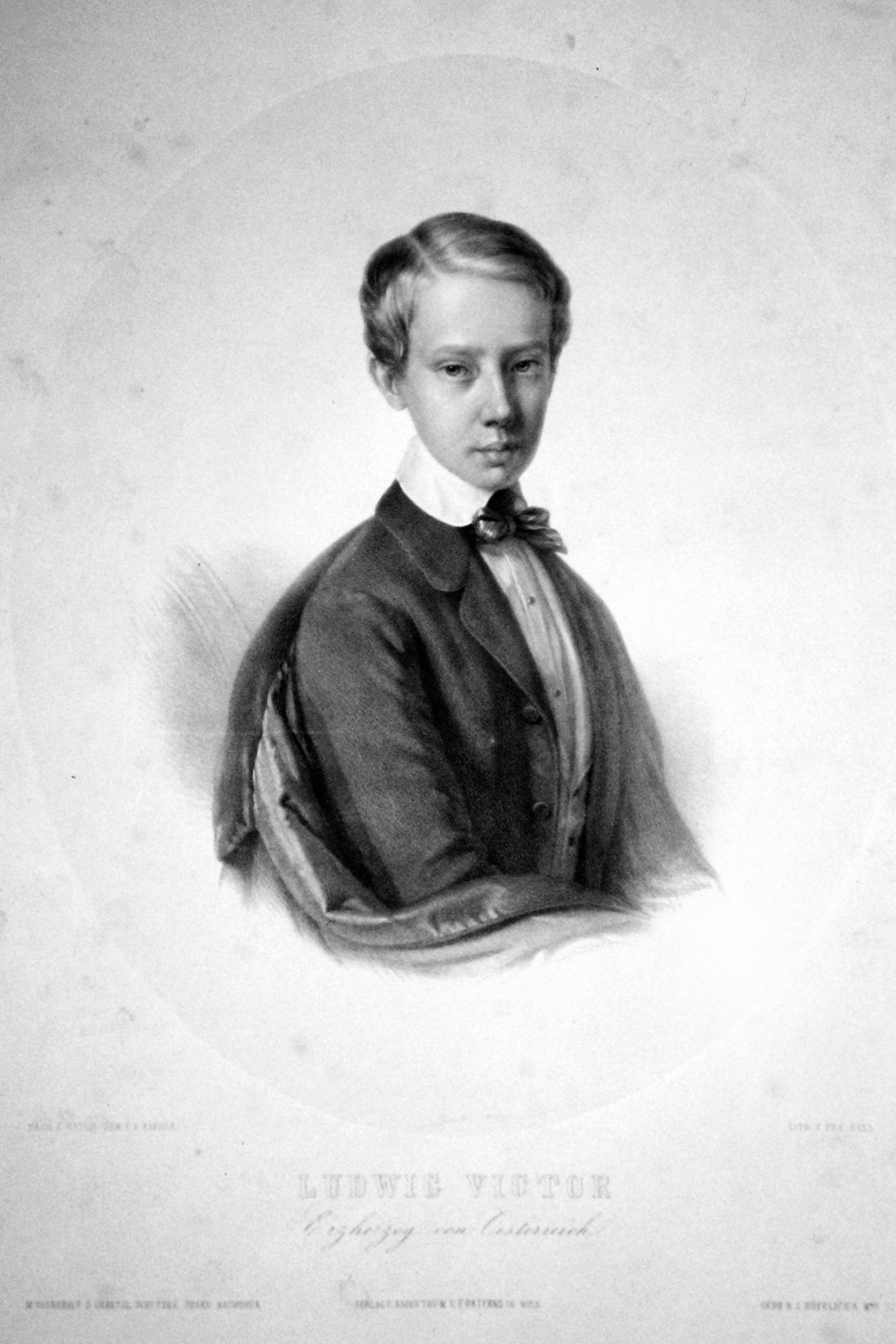 Ludwig Viktor (1842-1919), Erzherzog. Lithographie von Franz Eybl, um 1850